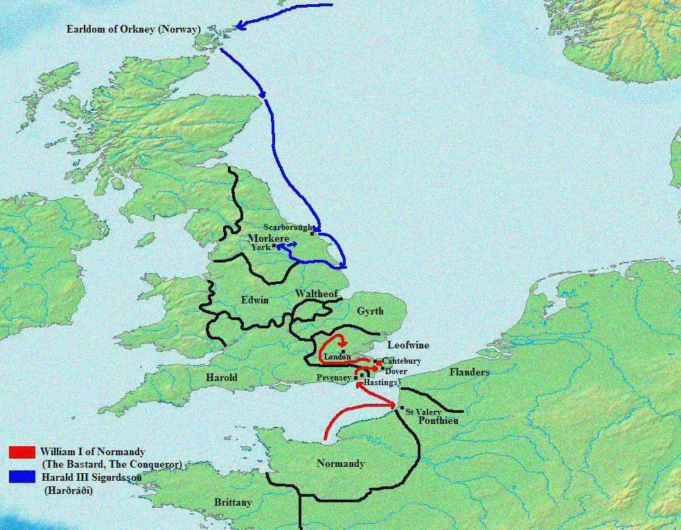 Norman conquest map